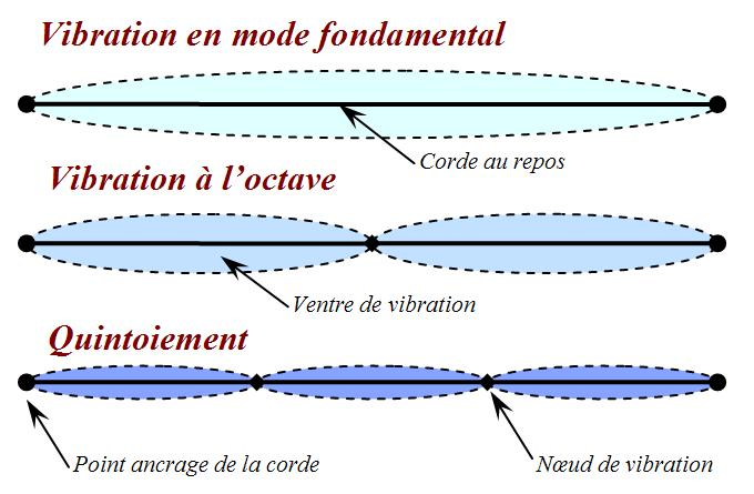 Schéma personnel. vibration transverale d'une corde, en mode fondamental, à l'octave et au quintoiement.